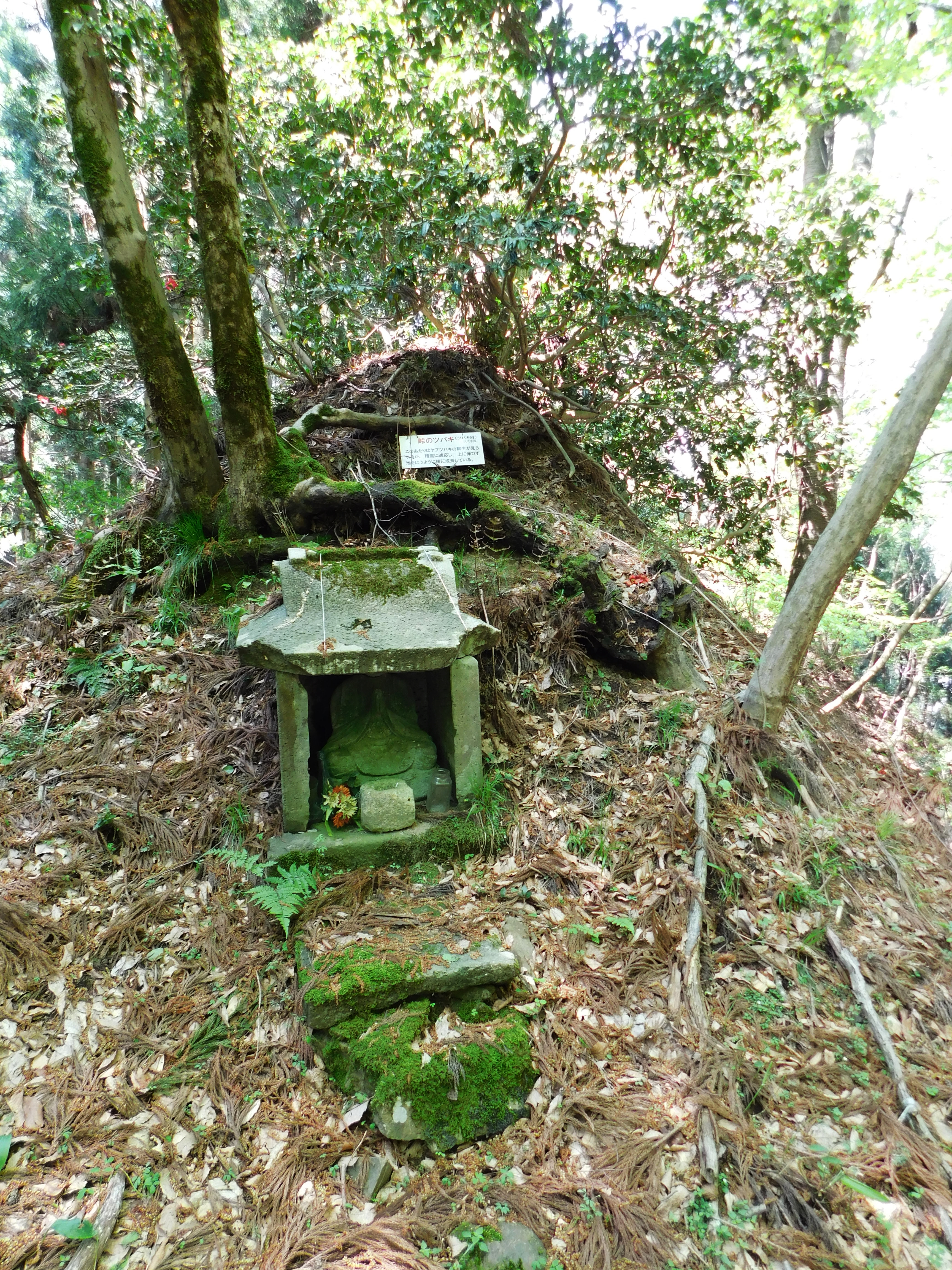 福井県越前市の府中馬借街道(西街道ともいう)、敦賀湊～河野・今泉浦(海上七里)～梨木峠～中山峠～湯谷～大坂峠～当ヶ峰～追分～広瀬～馬塚～府中(陸上四里)の街道、鎌倉時代から戦国時代にかけては軍事面でも重要な交通路であった、江戸時代には北前船の発展に伴い、物資輸送路として隆盛した。